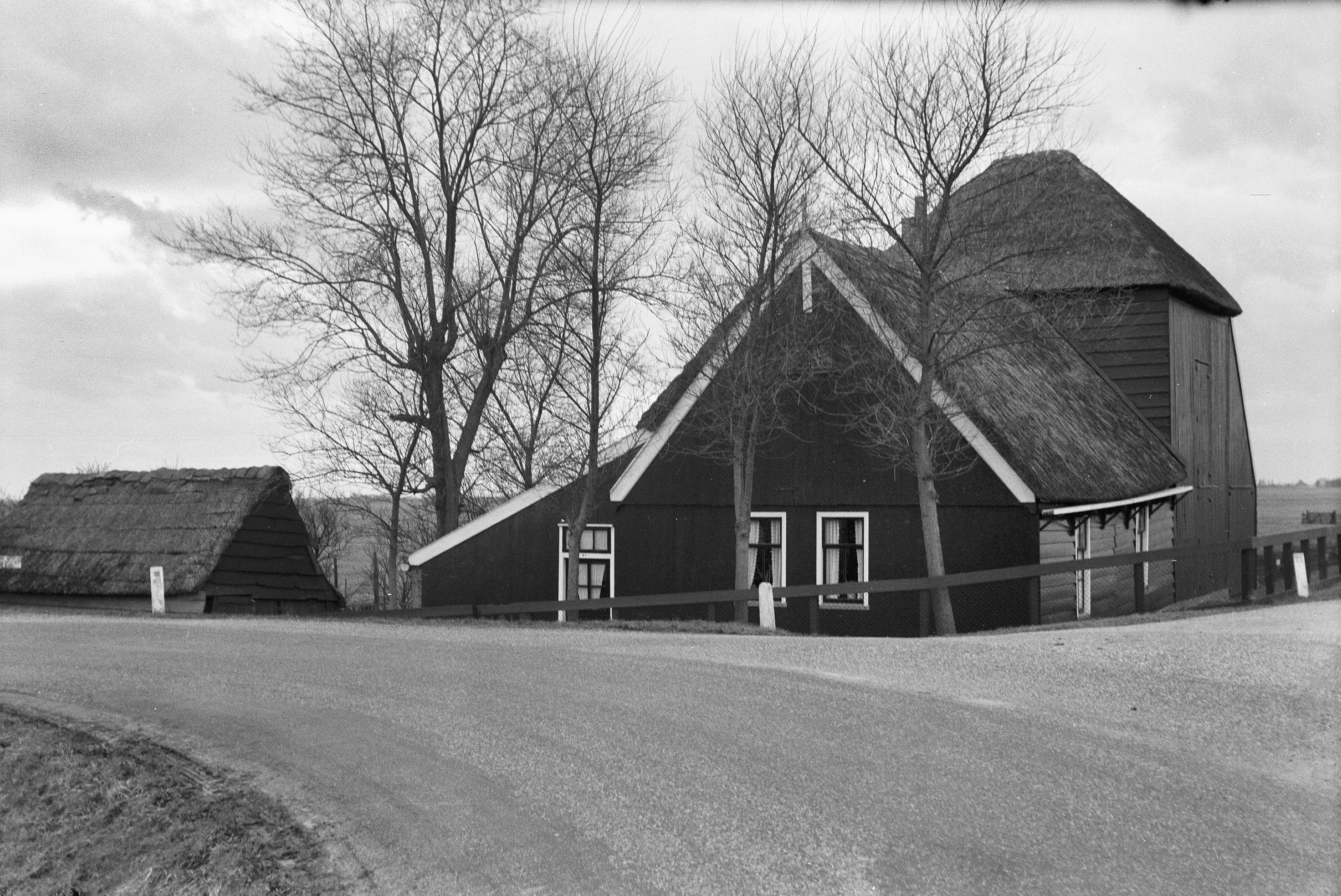 Boerderijen/ Hooihuis: Aan bocht van een weg gelegen houten boerderij met rieten dak, vrijstaande kleine schuur en houten hooihuis met rieten dak (opmerking: Begin 1800)